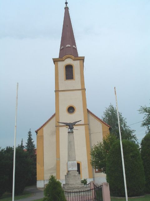 Roman Catholic Church in Vasasszonyfa, Hungary. Nagyboldogasszony római katolikus templom